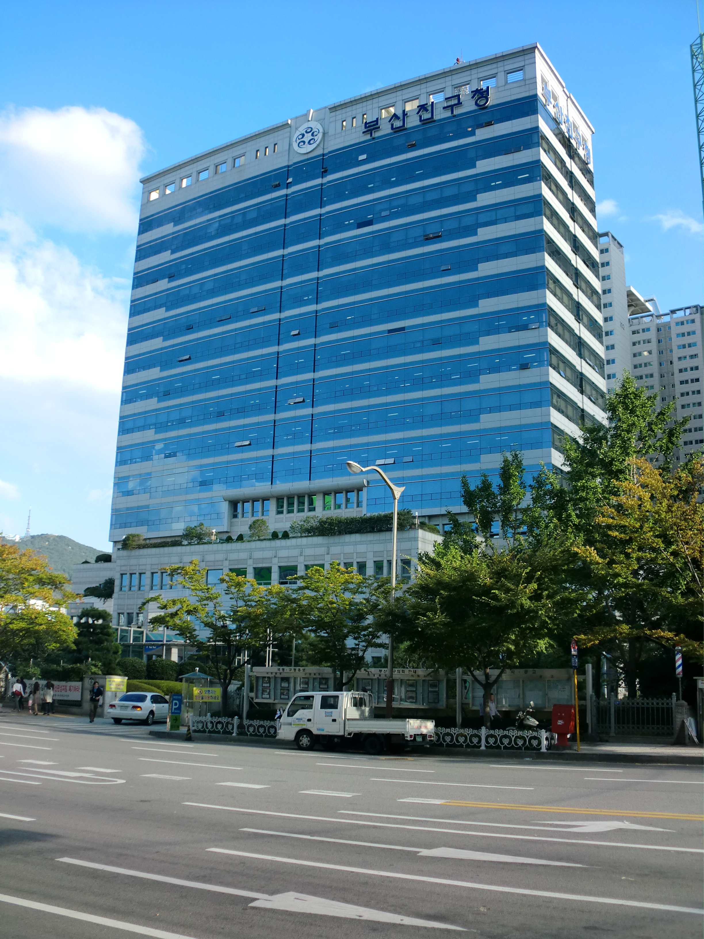 부산광역시 부산진구청